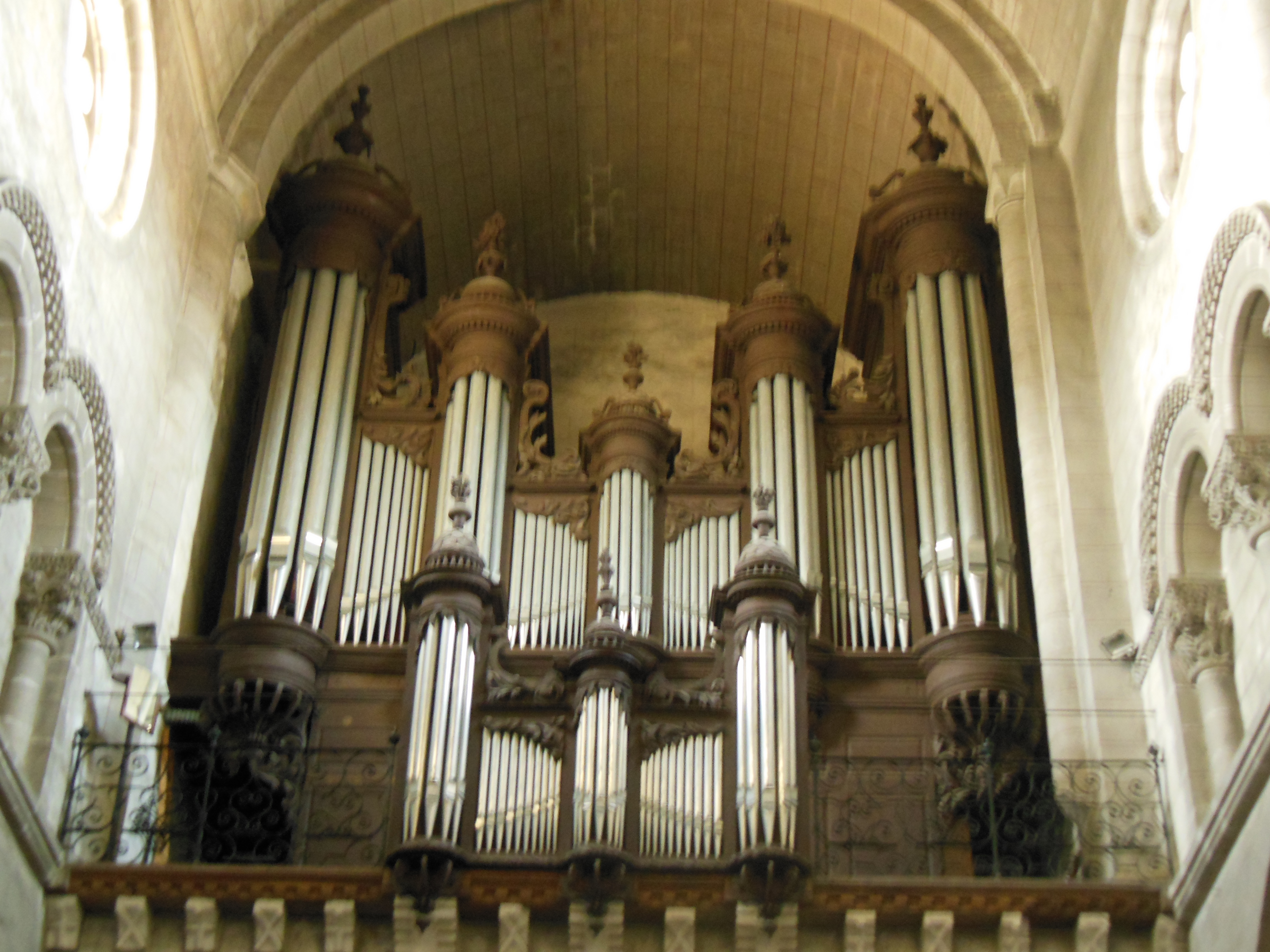 Abbatiale de Saint-Sever (Landes, France), dans le buffet de 1711 de François Picard dit Lespine, instrument commencé par Aristide Cavaillé-Coll en 1896, achevé en 1900 par Ernest Bouilloux, restauré en 1980 par Robert Chauvin.